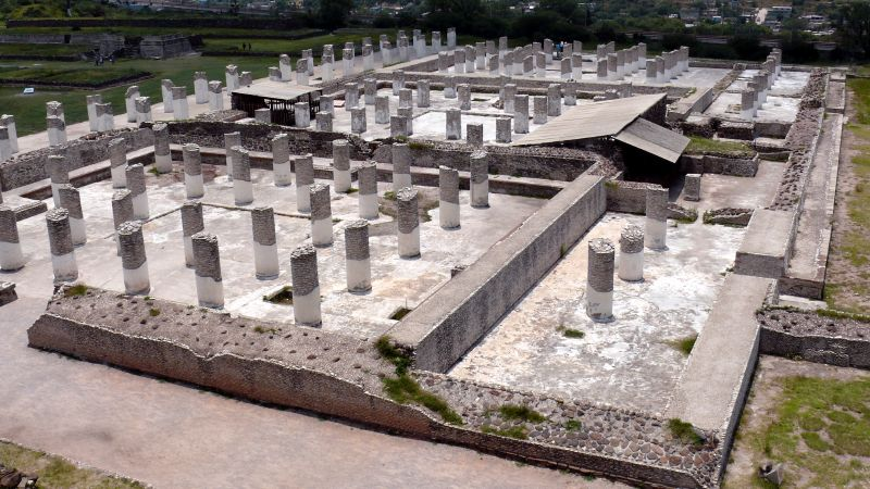 Tula, Hidalgo.